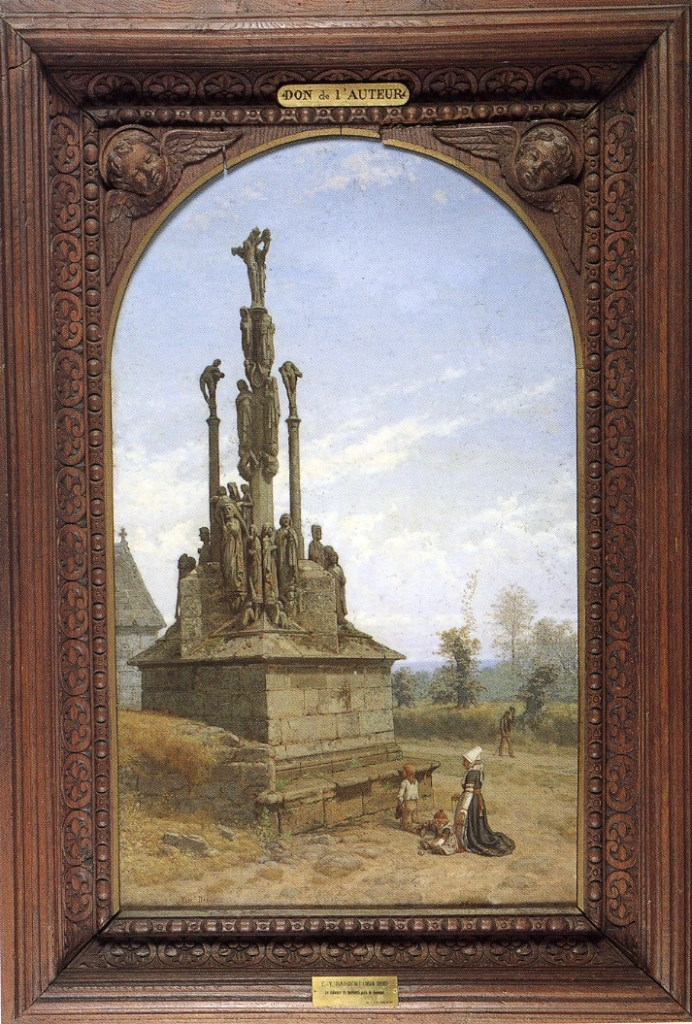 Tableau de Yan'Dargent, H. x L. : 100,2 x 60,4 cm ; H. x L. x P. (avec cadre) : 127 x 86,2 x 11 cm, 1893, don de l'artiste au Musée des Beaux-Arts de Quimper en 1895